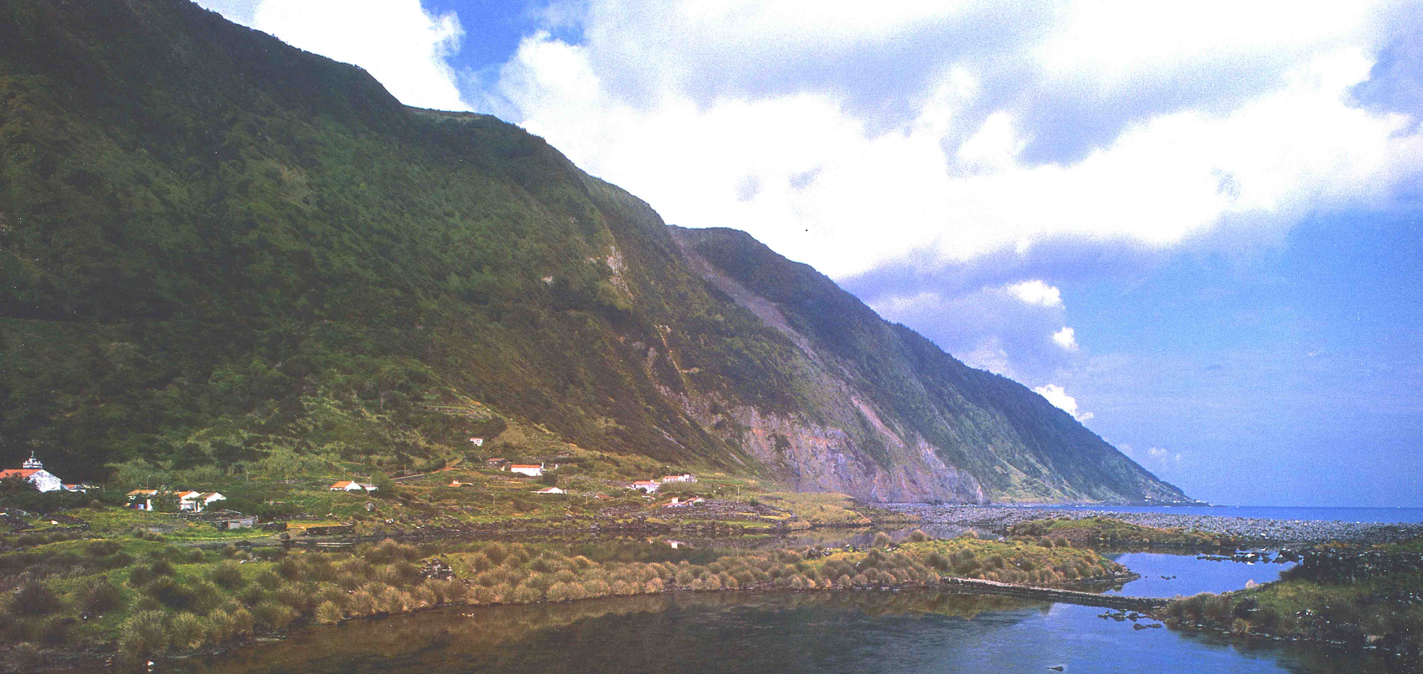 Lagoa da Fajã dos Cubres, Ilha de São Jorge, Açores.